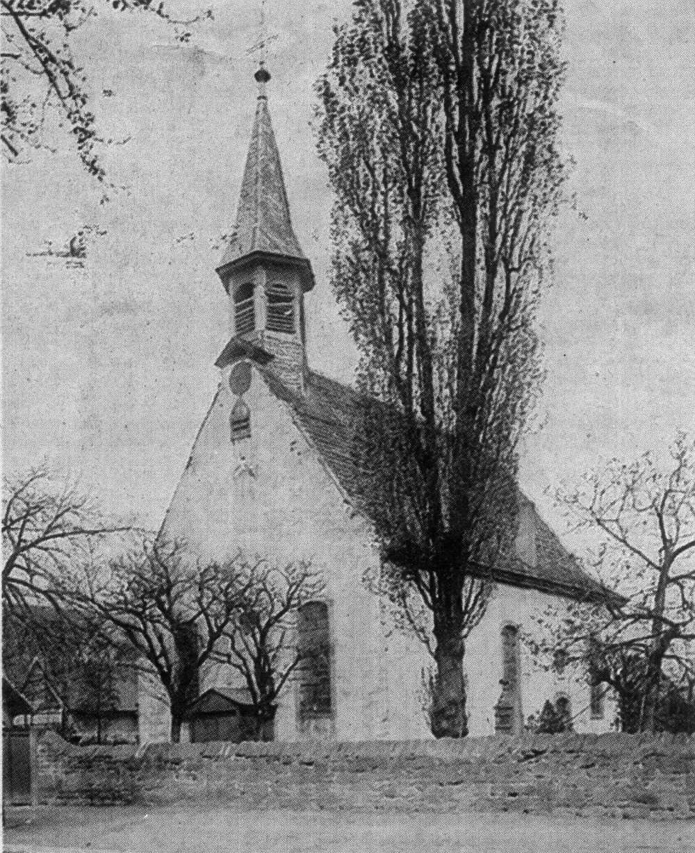 alte evangelische Pfarrkirche in Neulußheim, erbaut 1807, wich 1909 einem Neubau